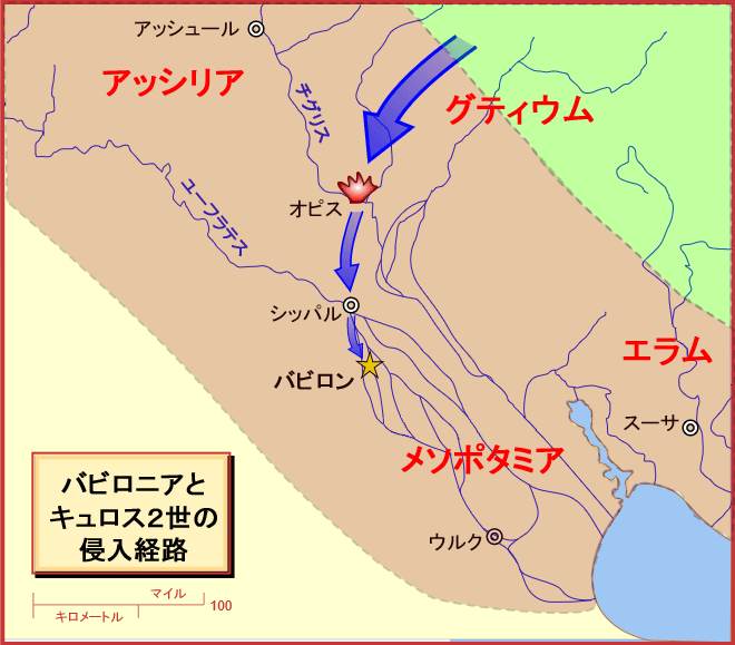 ペルシア軍の侵入経路（オピスの戦い）